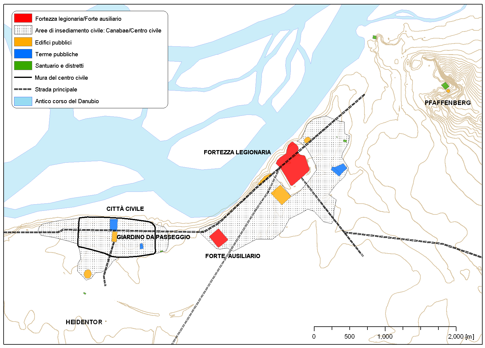 Italian version of File:Carnuntum map Roman city.gif